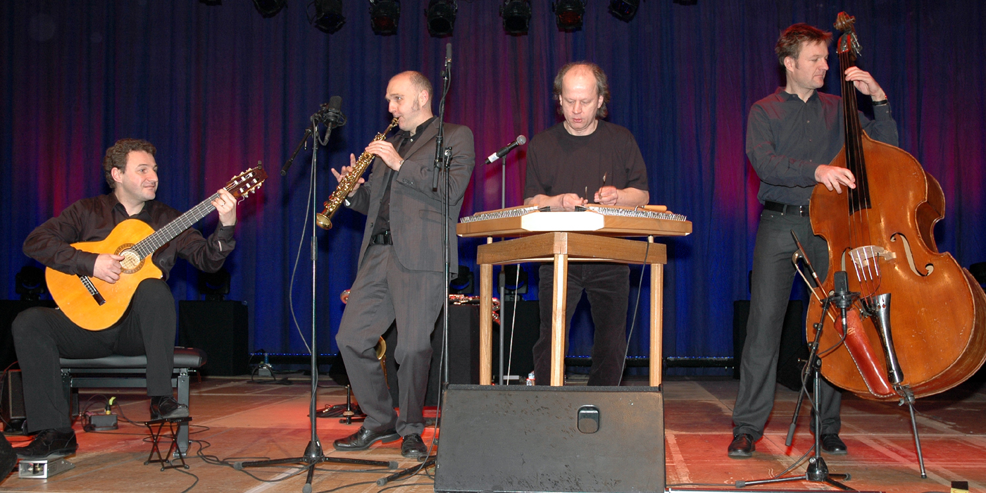 Zapf'nstreich mit Rudi Zapf bei ihrem Auftritt auf der Internationalen Kulturbörse in Freiburg 2012